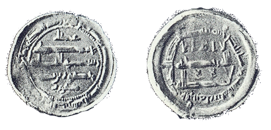 Monnaie Hafside frappée par l'insurgé Mansour Tonbohdi en 825